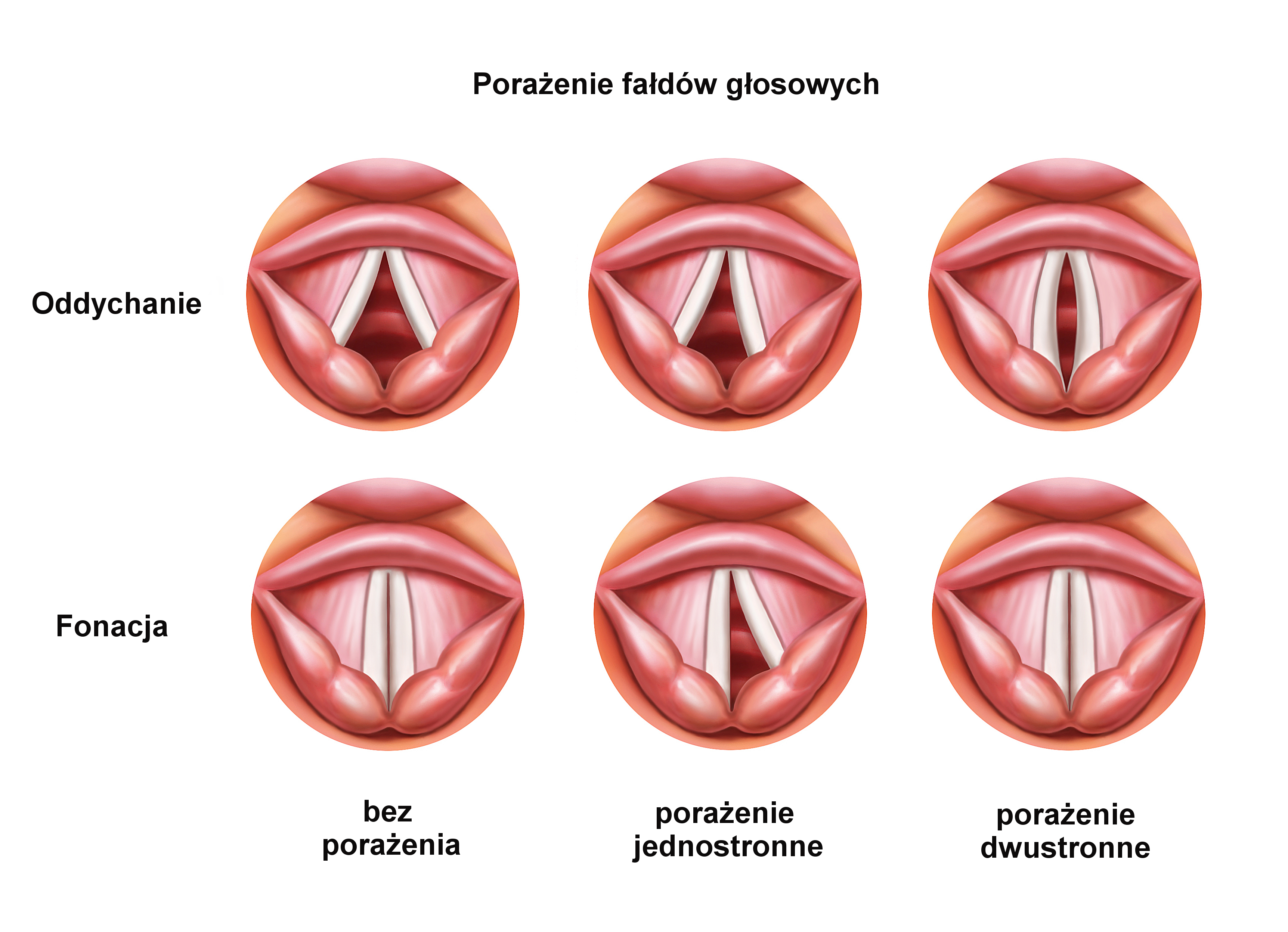 Ustawienie fałdów gosowych w oddechu i fonacji:pierwsza kolumna: prawidłowa ruchomość fałdów głosowych; druga kolumna: porażenie prawego fałdu głosowego; trzecia kolumna: obustronne porażenie fałdów głosowych.